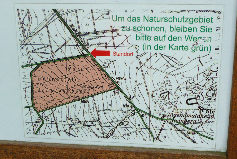 Karte am Hühnerfeld auf öffentlichem Schild, daher Panoramfreiheit